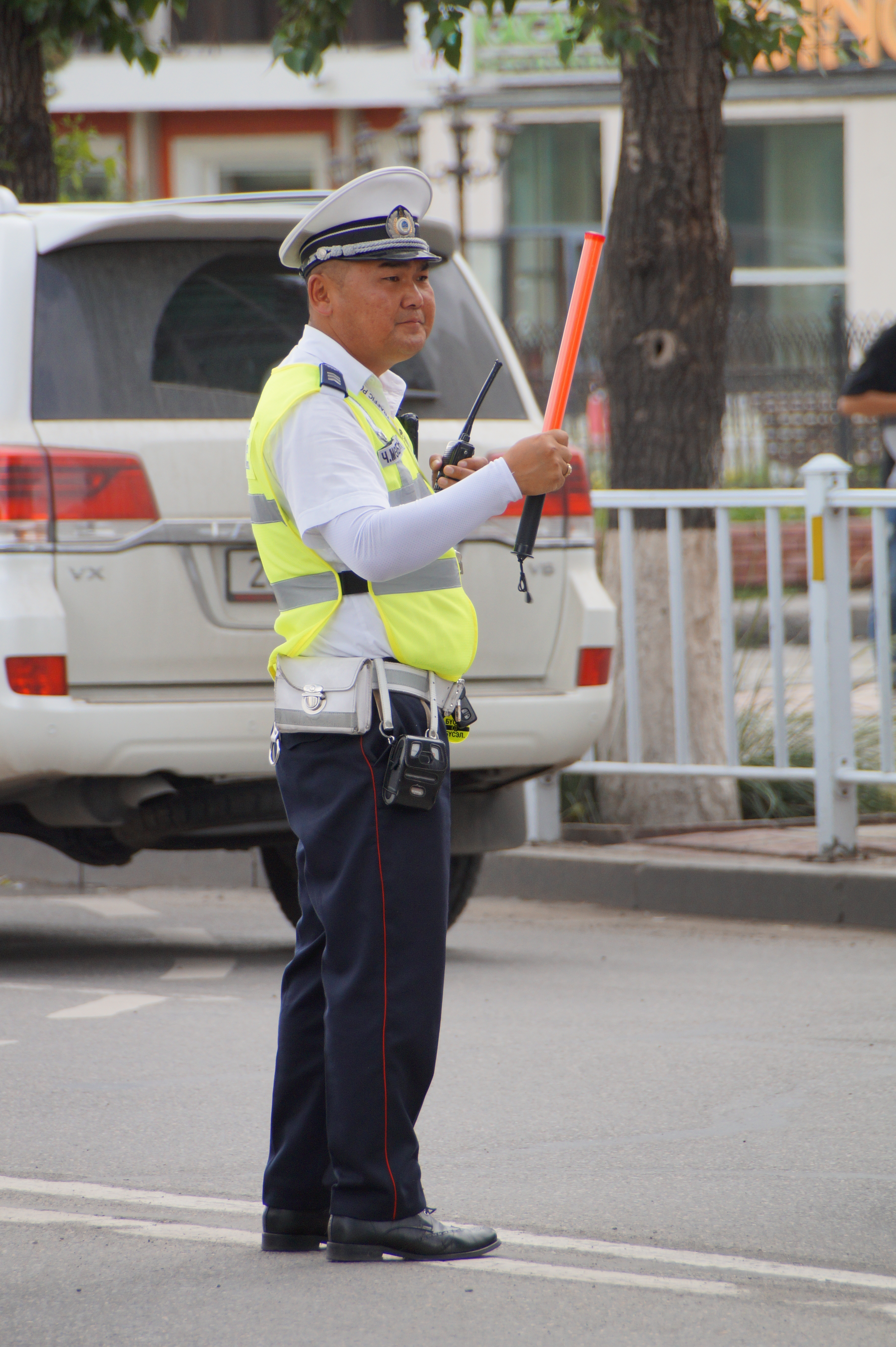 Mongolia - Police